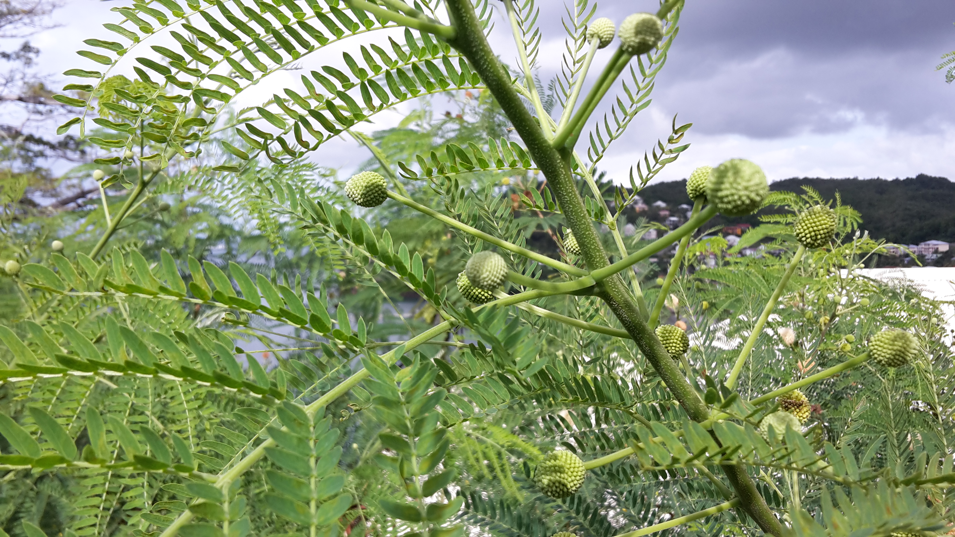 Boutons floraux sur une branche de Leucaena leucocephala